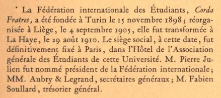 Rappel en bas de page de l'édition du discours aux étudiants prononcé par Anatole France.